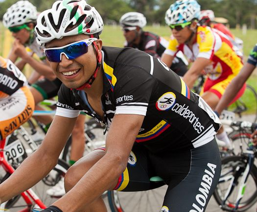 Darwin Atapuma. Ciclista del equipo Colombia-Coldeportes en la Vuelta a Colombia 2012